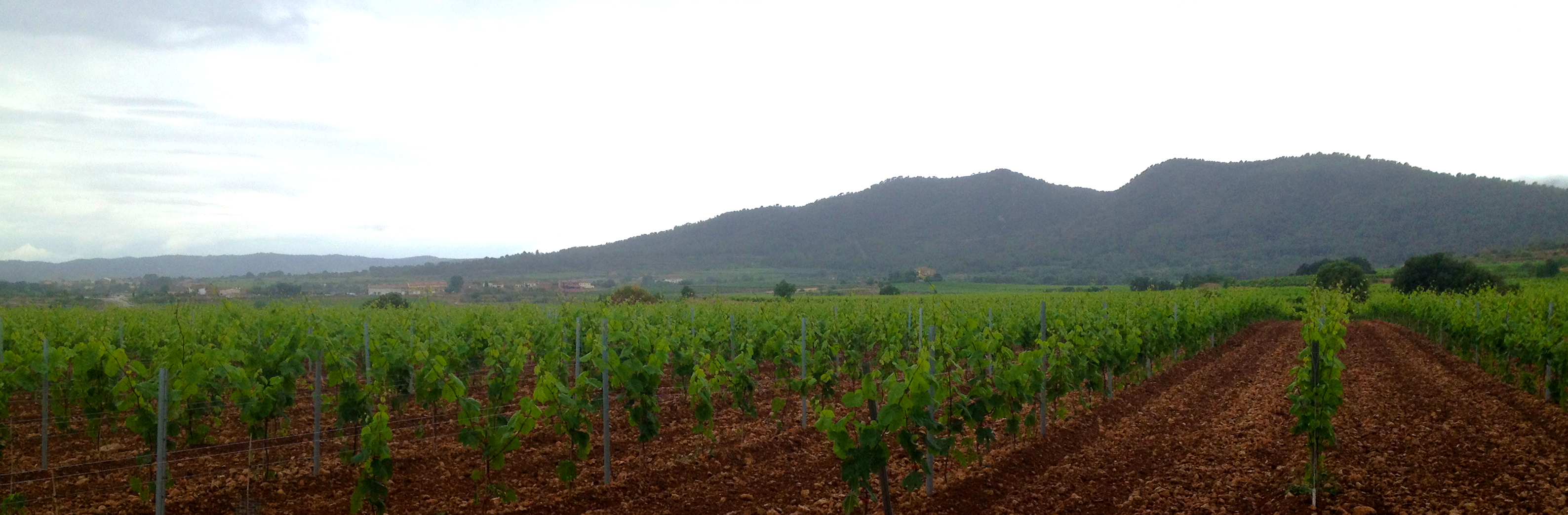 L'Hostal a la falda de les Bessones.